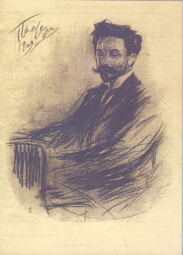 Портрет Александра Скрябина, сделанный Леонидом Пастернаком